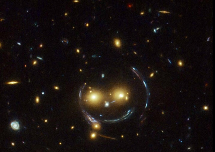 Image prise par le télescope Hubble, donnant l'impression d'un « smiley » et témoignant d'un phénomène optique connu sous le nom de « lentille gravitationnelle ».